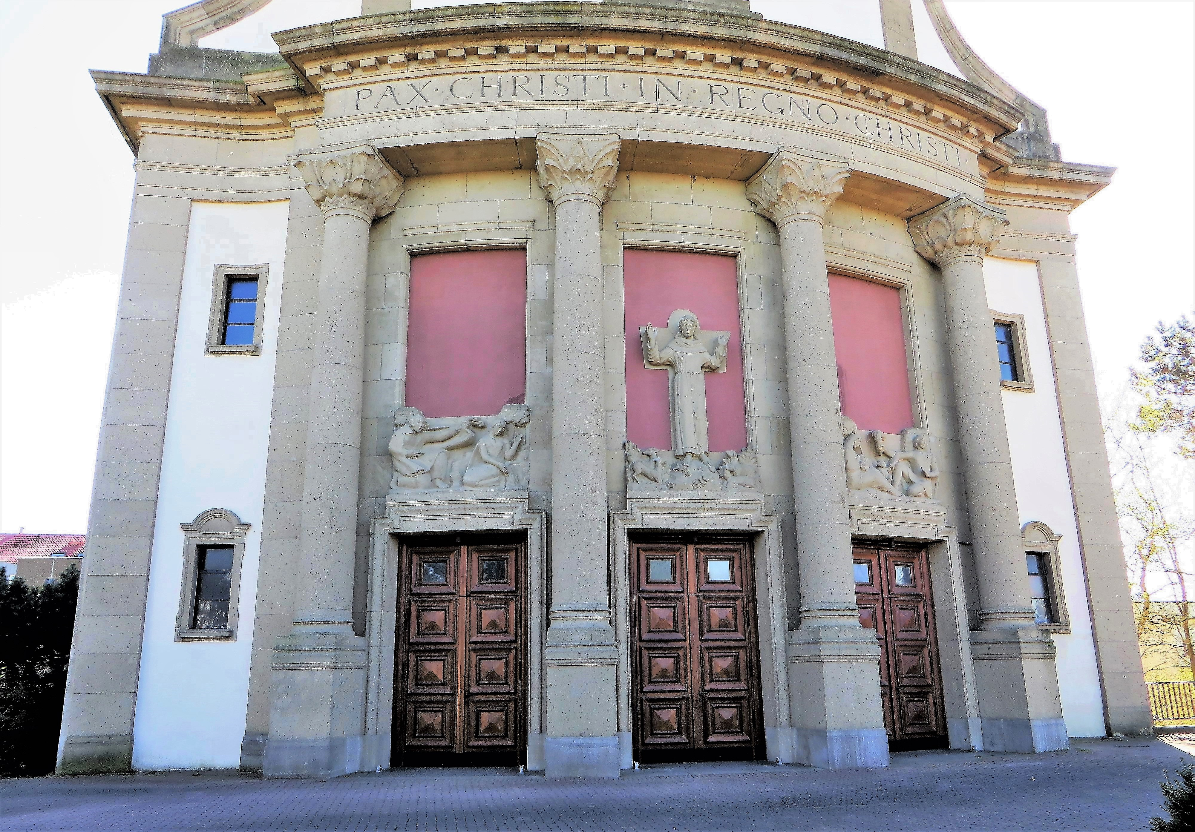 Hauptportal der katholischen St. Elisabeth Kirche in Hagen, Scharnhorststraße 27. Im neobarocken Baustil von 1924 bis 1927 errichtet. Den reichen Skulpturenschmuck an der Hauptschauseite im Westen schufen 1926/27 Berthold Müller-Oerlinghausen und Jenny Müller-Wiegmann. In der Mitte Franziskus von Assisi. Die Elisabethkirche gehörte bis 1988 ursprünglich zu einem Franziskanerkloster.